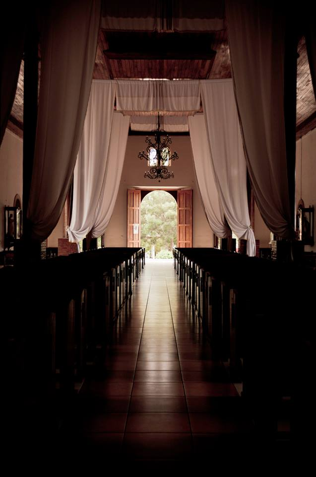 Interior de Iglesia San Juan Bautista Masatepe